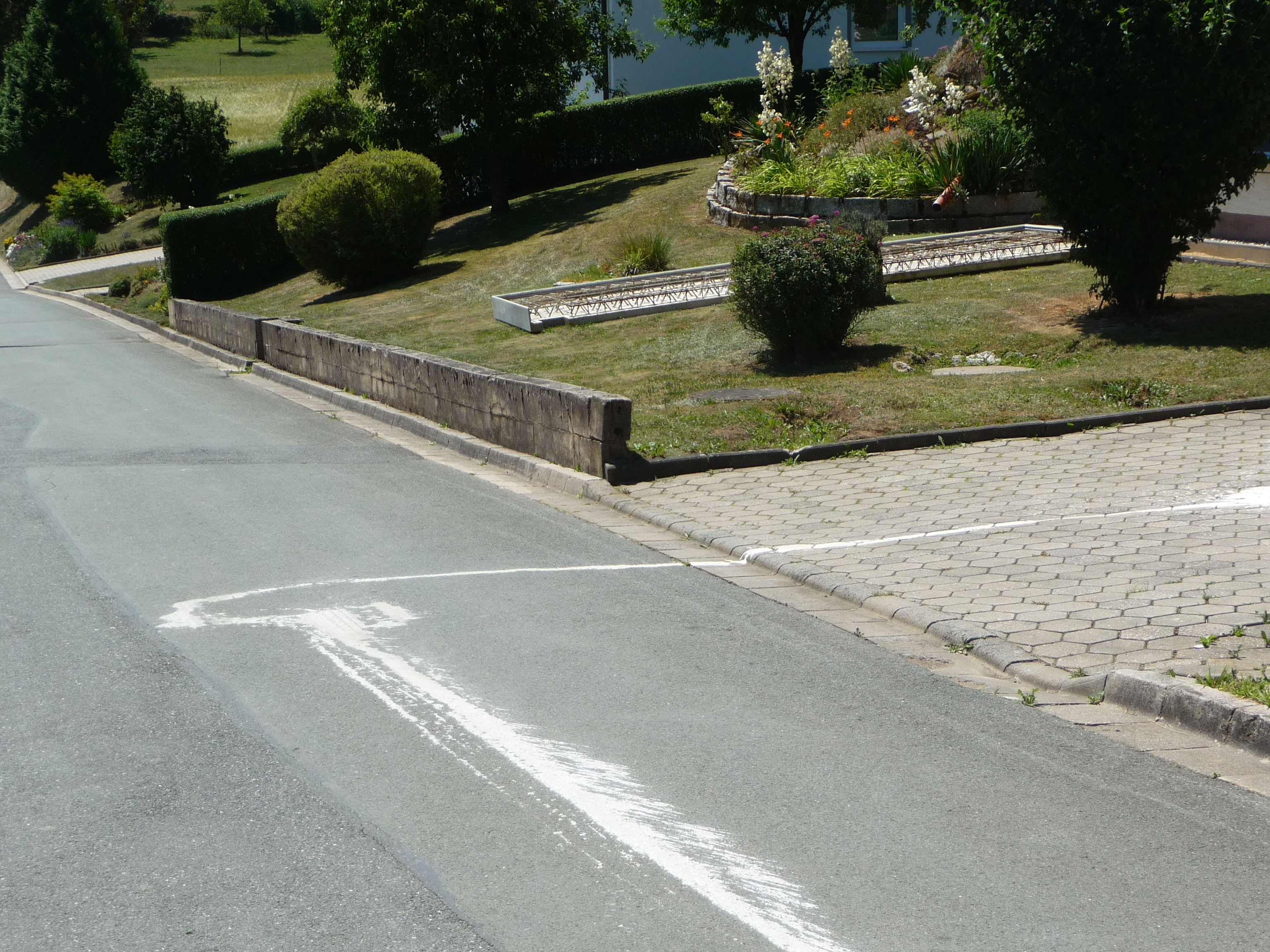 Freunde/Verwandte reisen von der Wohn-/Elternanschrift der Braut zur Wohn-/Elternanschrift des Mannes, wobei eine Spur gelegt wird, die diese beiden Orte miteinander verbindet. Der Weg führt vorbei an (fast) allen Anschriften der unverheirateten, ehemaligen Partner(-innen) von Braut und Bräutigam.